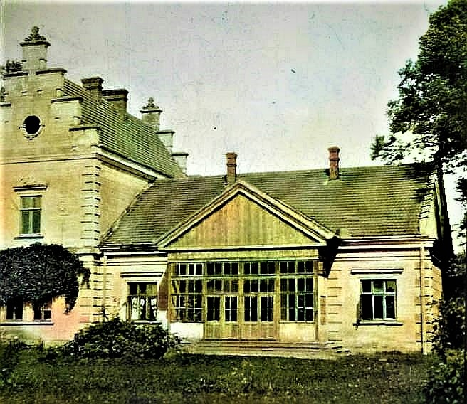 Dwór Rylskich w Dąbrówce (lata 30-te XX w.